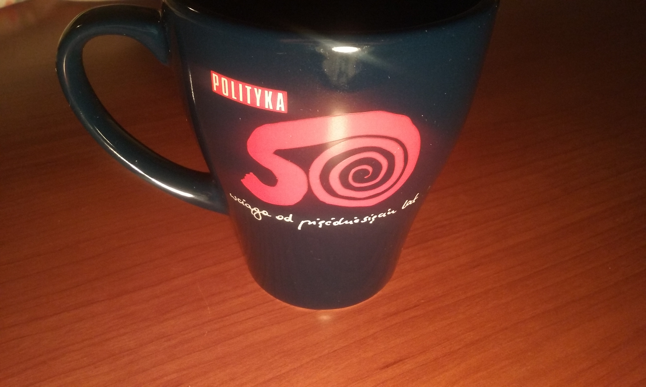 Pamiątkowy kubek redakcyjny z 2007 roku, wyprodukowany na pięćdziesięciolecie tygodnika Polityka Warszawska róg Szerokiej